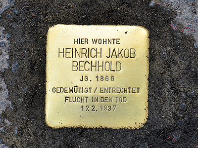 Stolpersteine Niederraeder Landstr 46 48